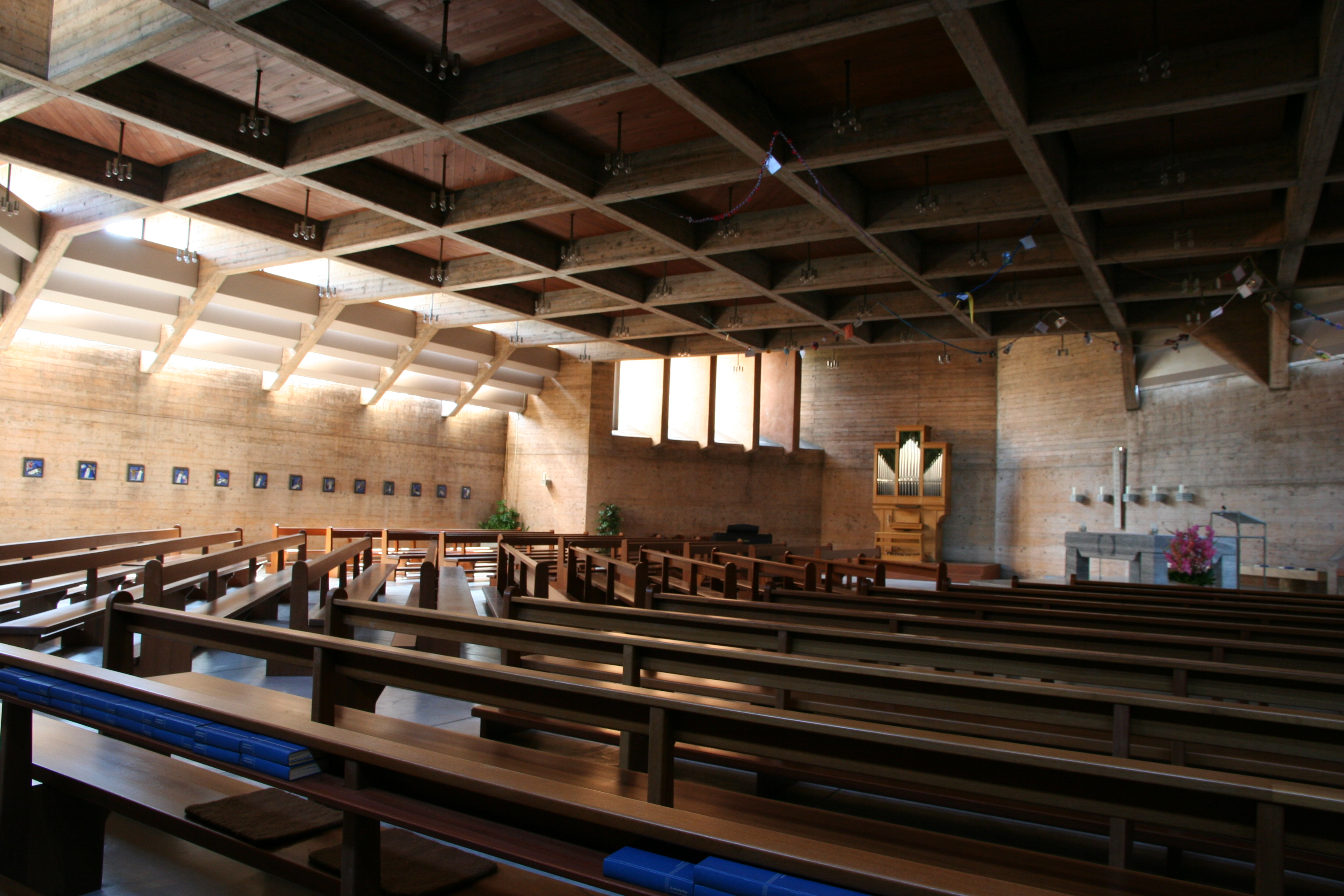 Römisch-katholische Pfarrkirche St. Martin Birmensdorf ZH